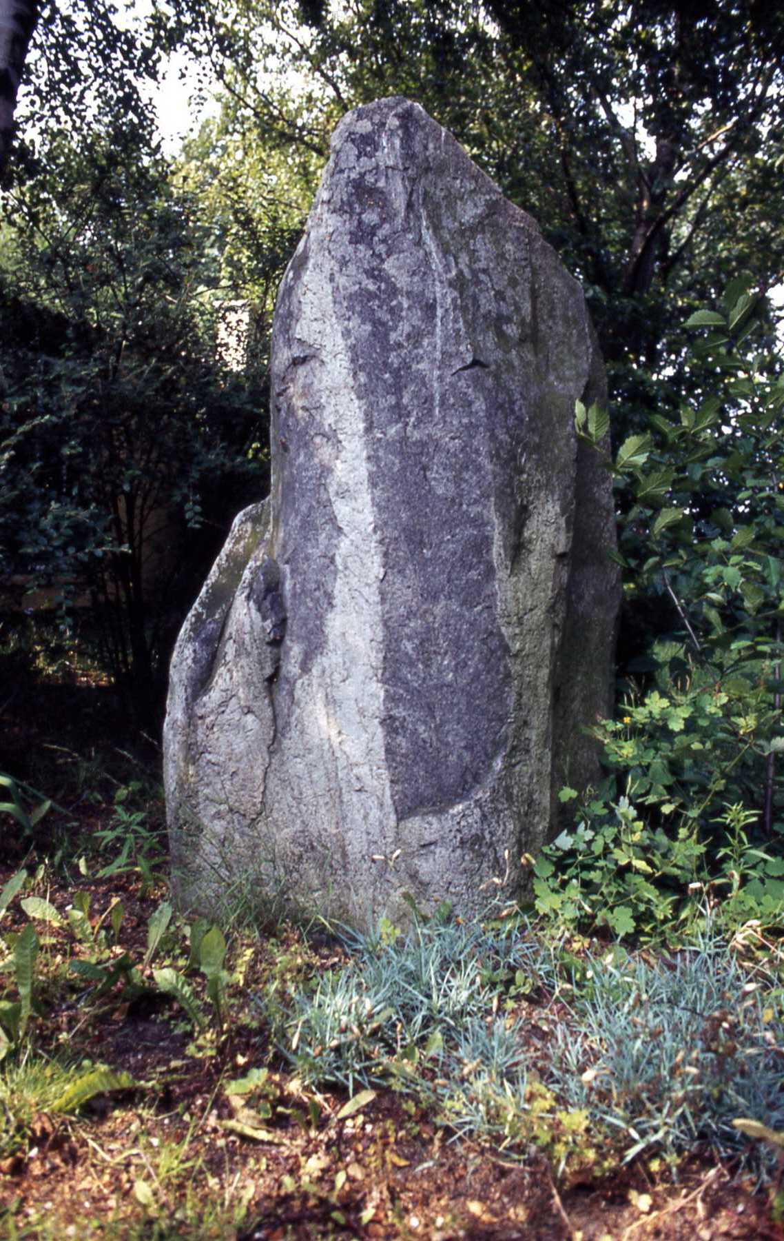 BautasteinDansk: en af 6 bautasten der udgør "Skrædderens falske Vidner" ved Bøgebjergvej 2 nord for Ruds Vedby